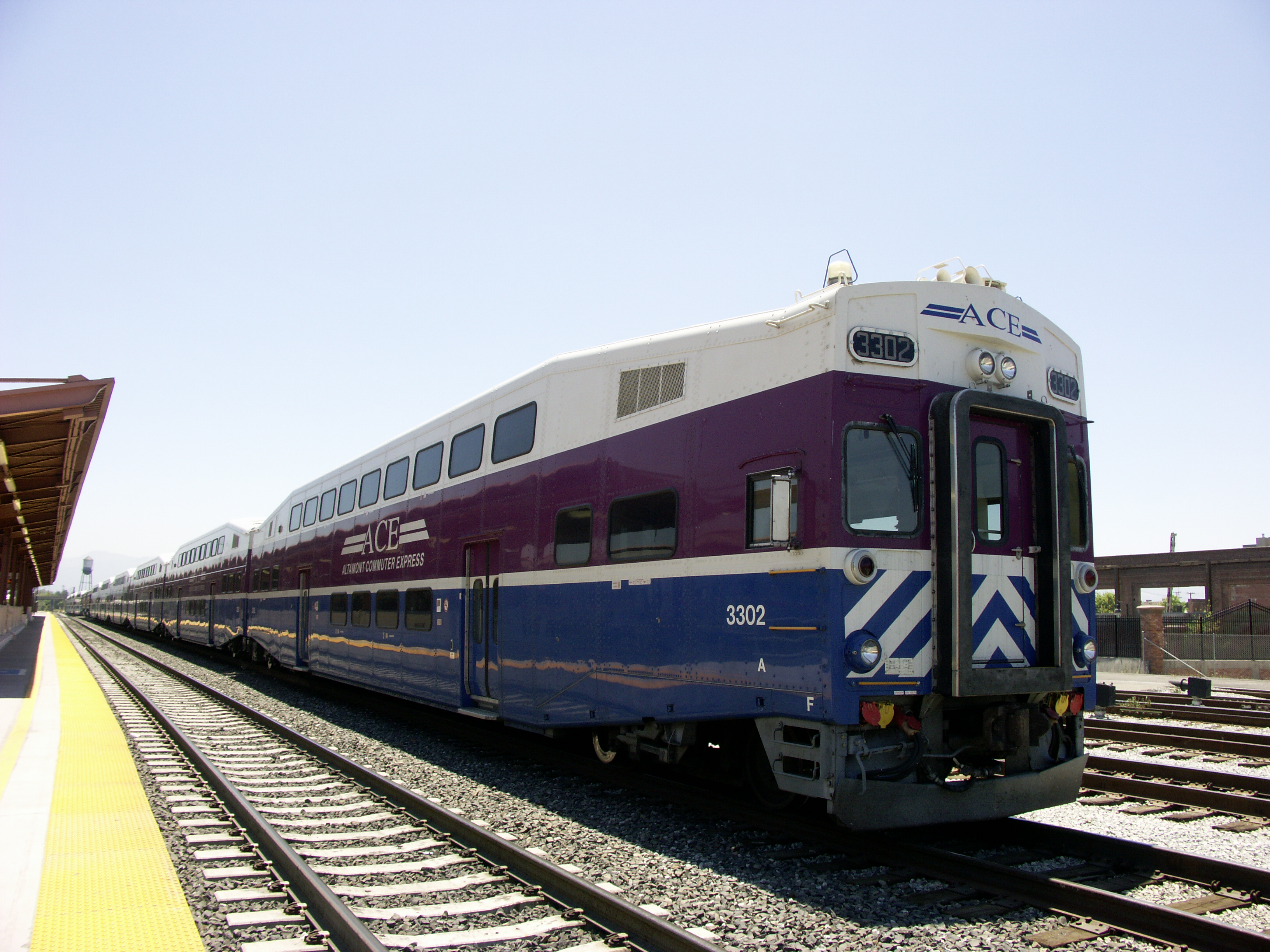 Altamont Commuter Express rearmost passenger car.